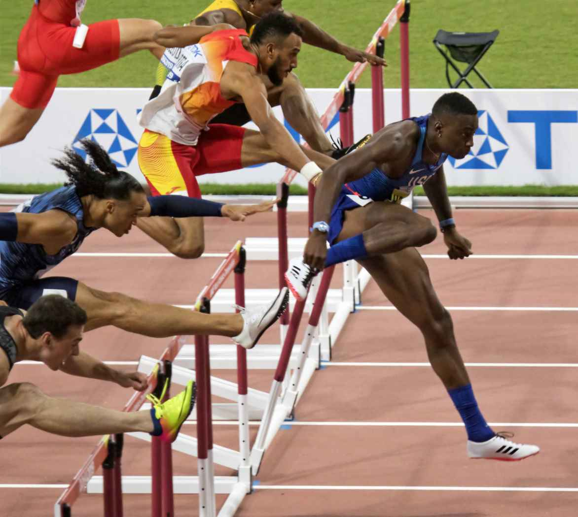 DOH60252 110mH men final